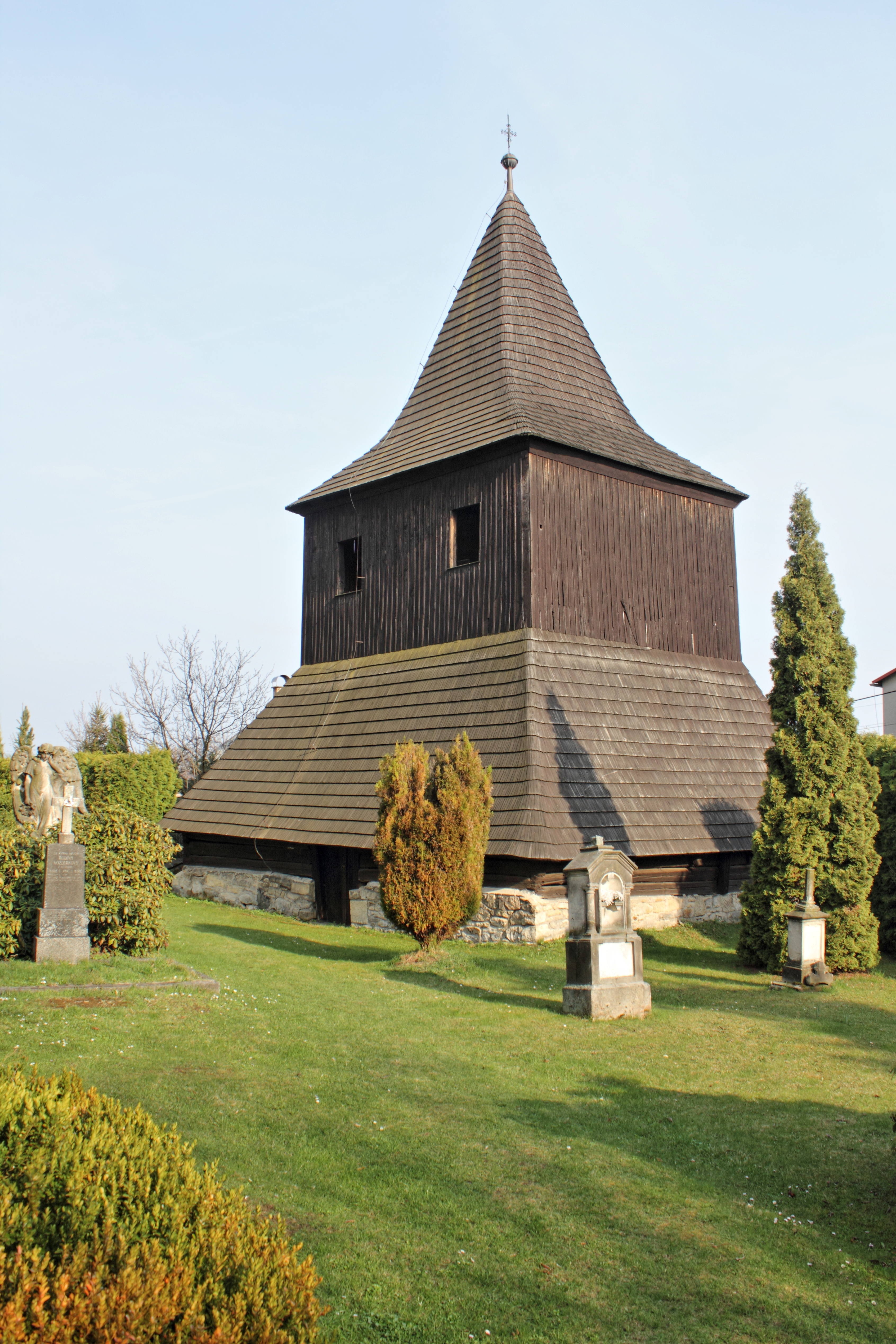 Dřevěná zvonice při kostele sv. Kateřiny, Vlastibořice